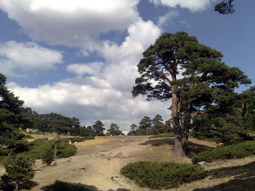 Camino Schmidt- Collado Ventoso, cruce con Senda de los Alevines.